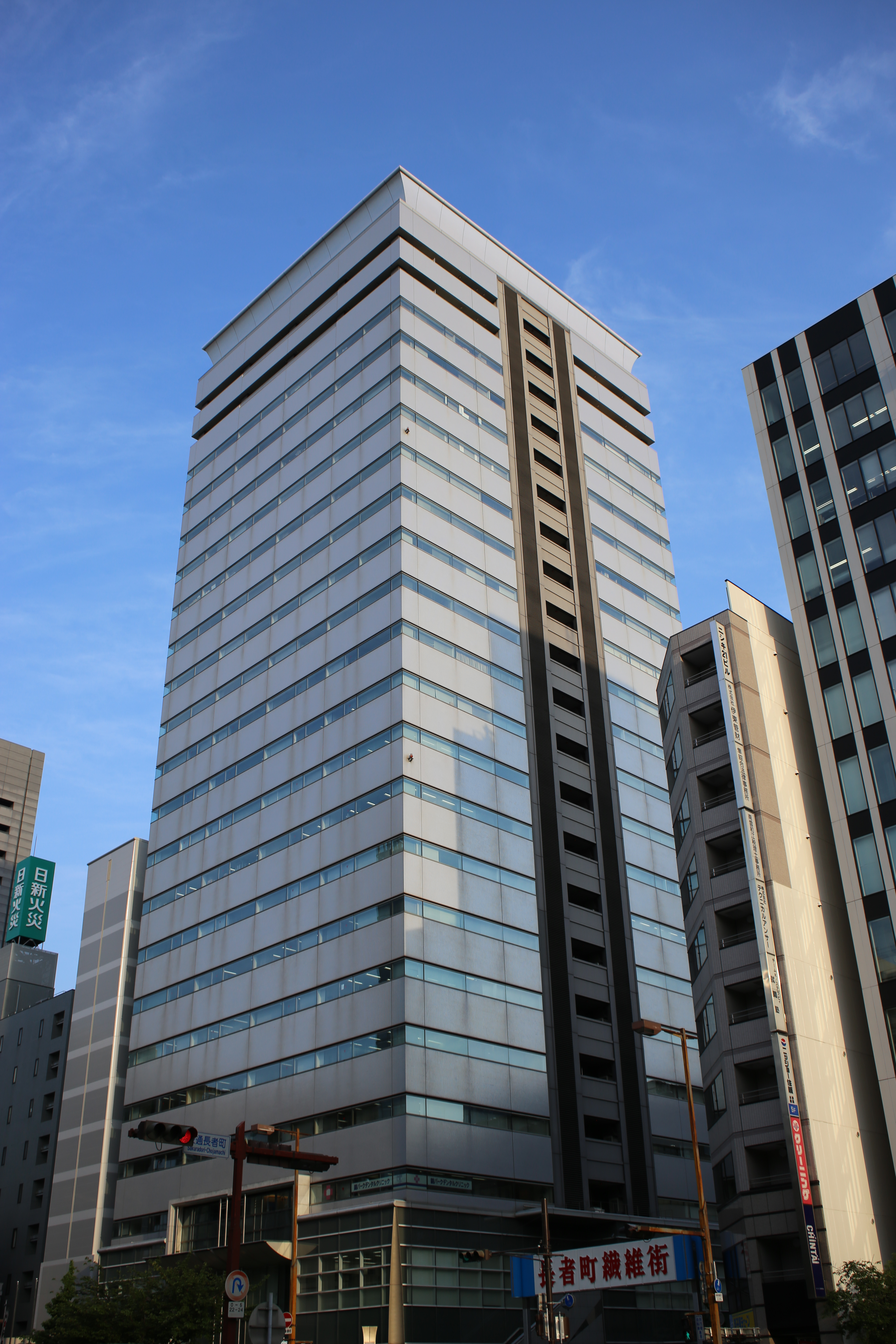 名古屋市中区錦二丁目の錦パークビルを北側公道西側より撮影